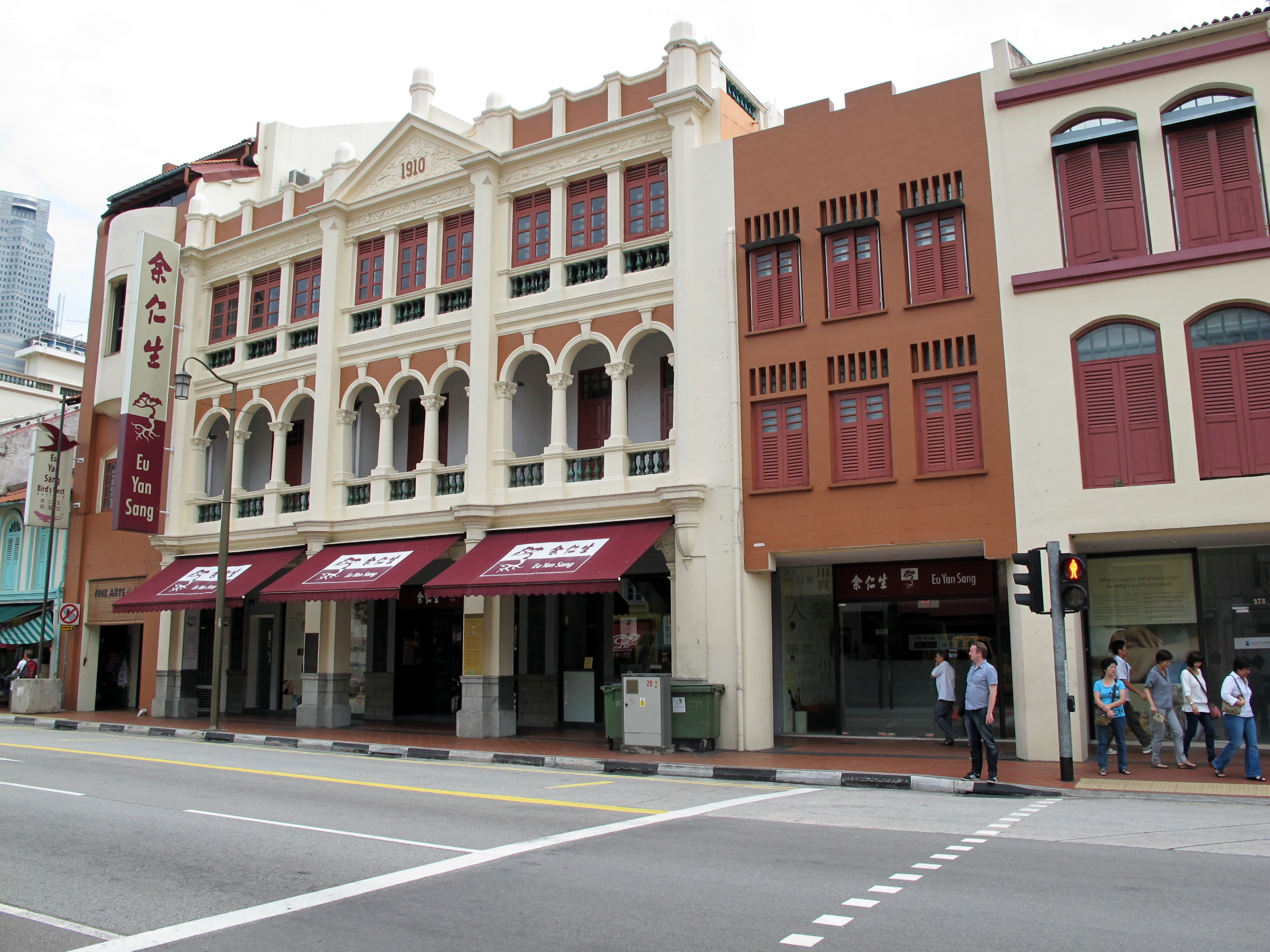 Eu Yan Sang Headquarters